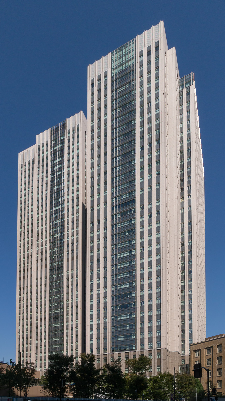 霞が関コモンゲート、文部科学省、金融庁。東京都千代田区霞が関。